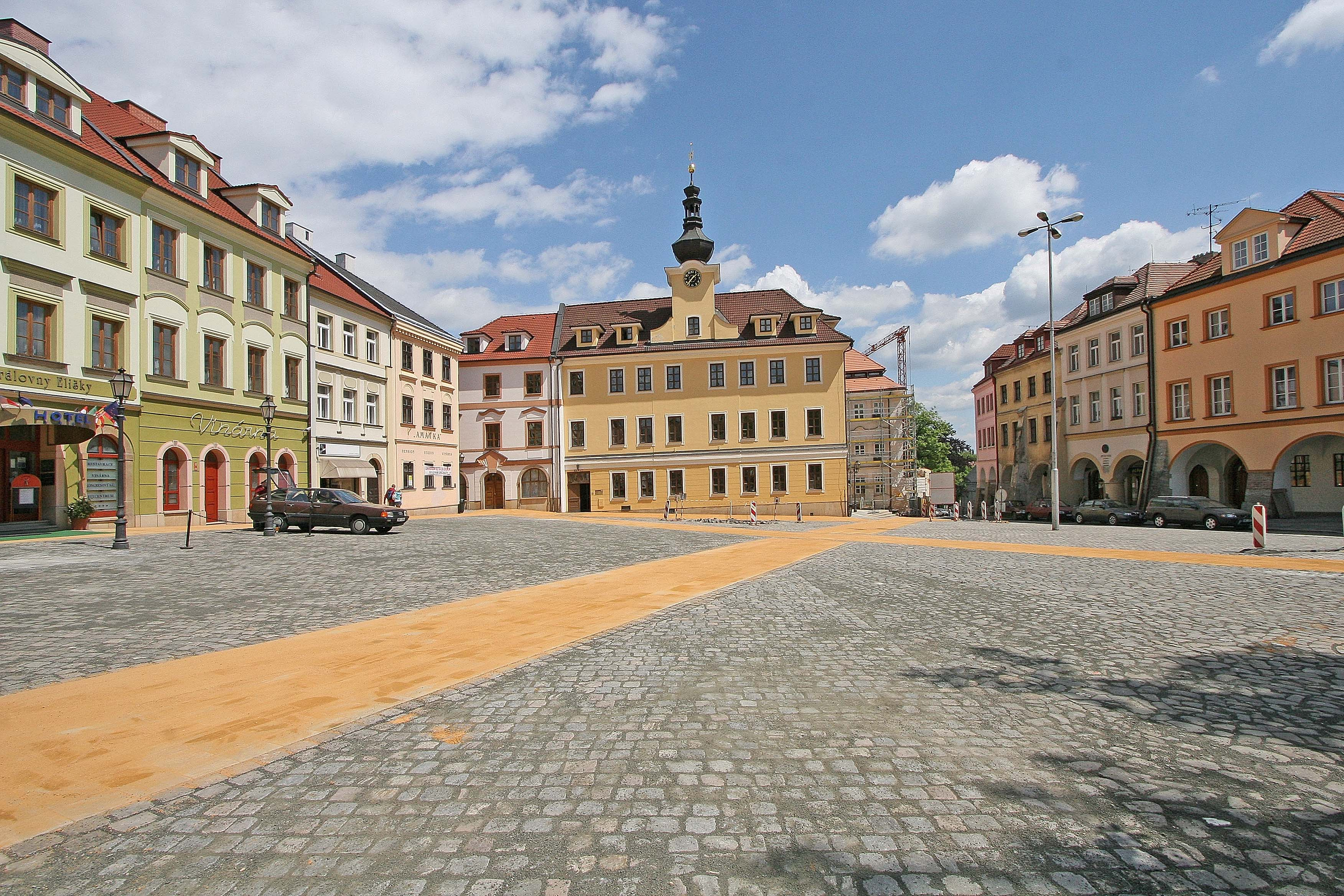 Hradec Králové - Malé náměstí